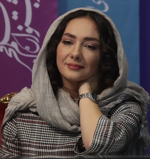 نشست خبری فیلم ایده اصلی